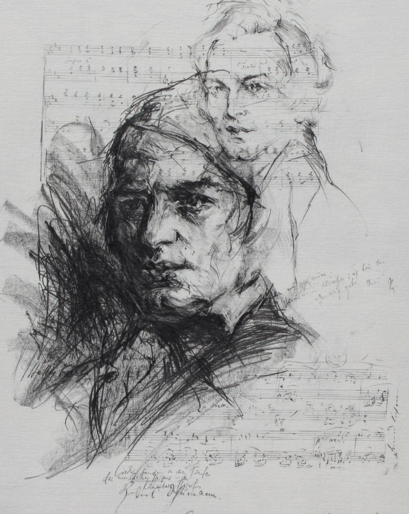 Hetty Krist, Robert Schumann (Lithographie)